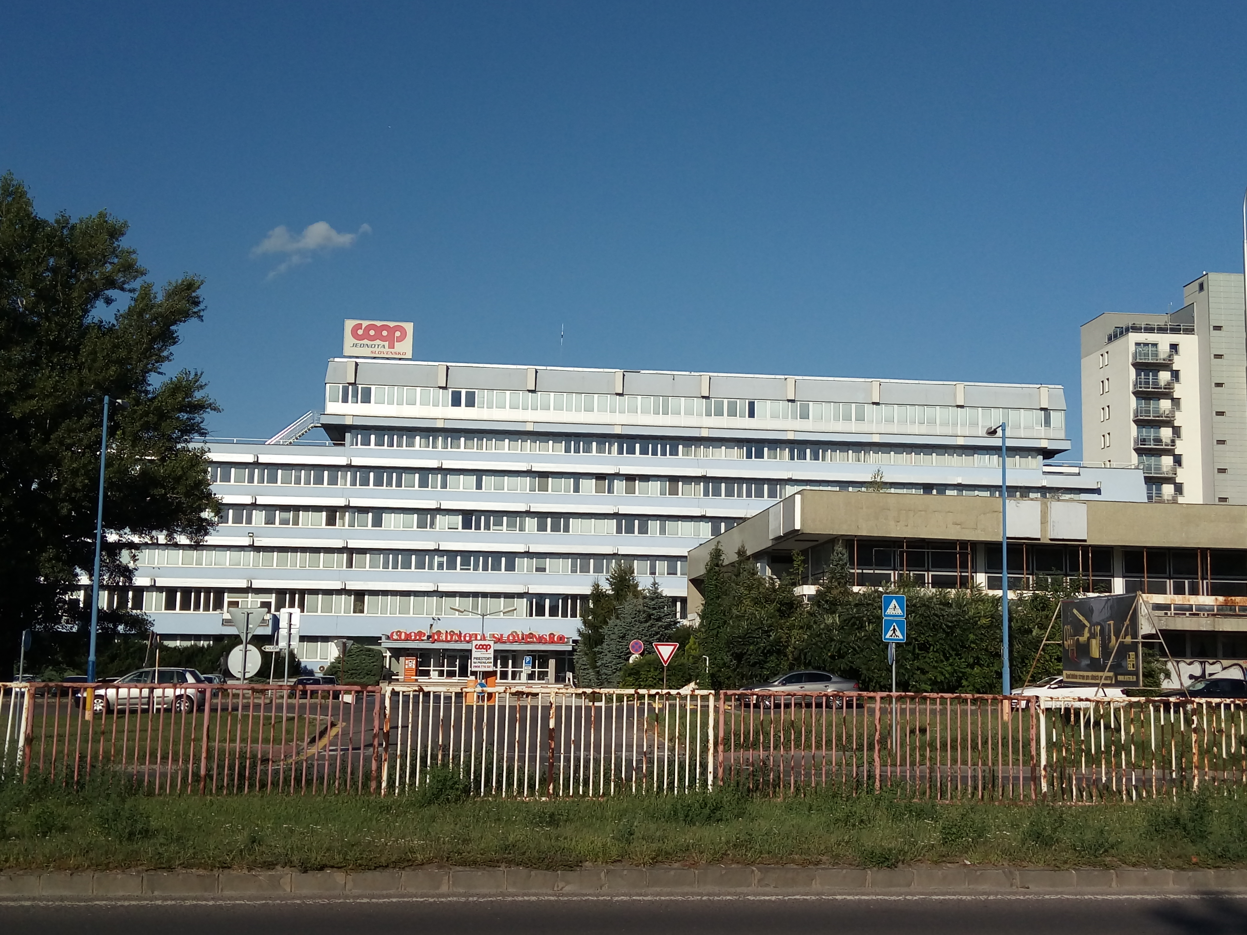 Bajkalská 25, Ružinov, Bratislava